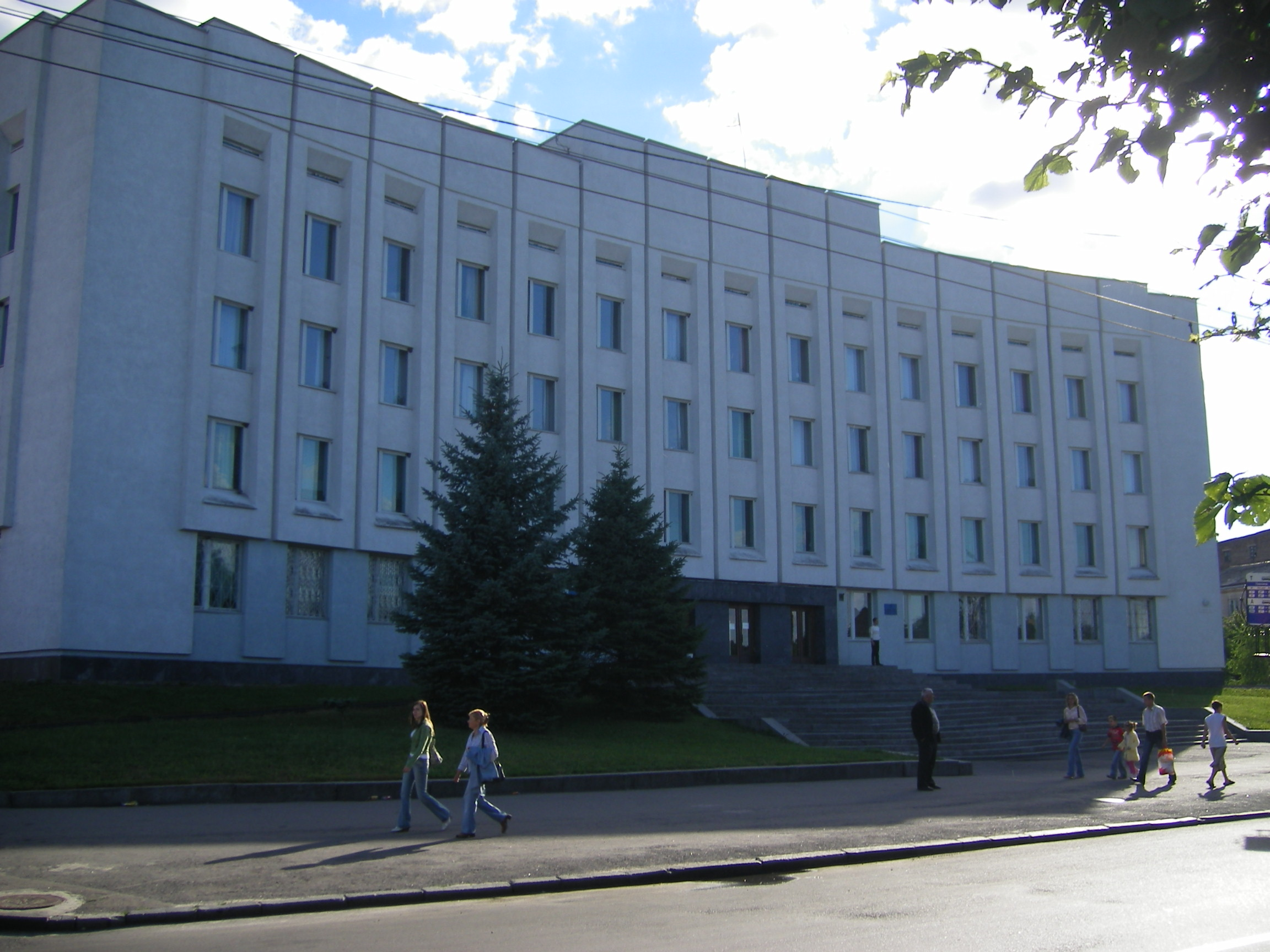 Рівненська районна рада